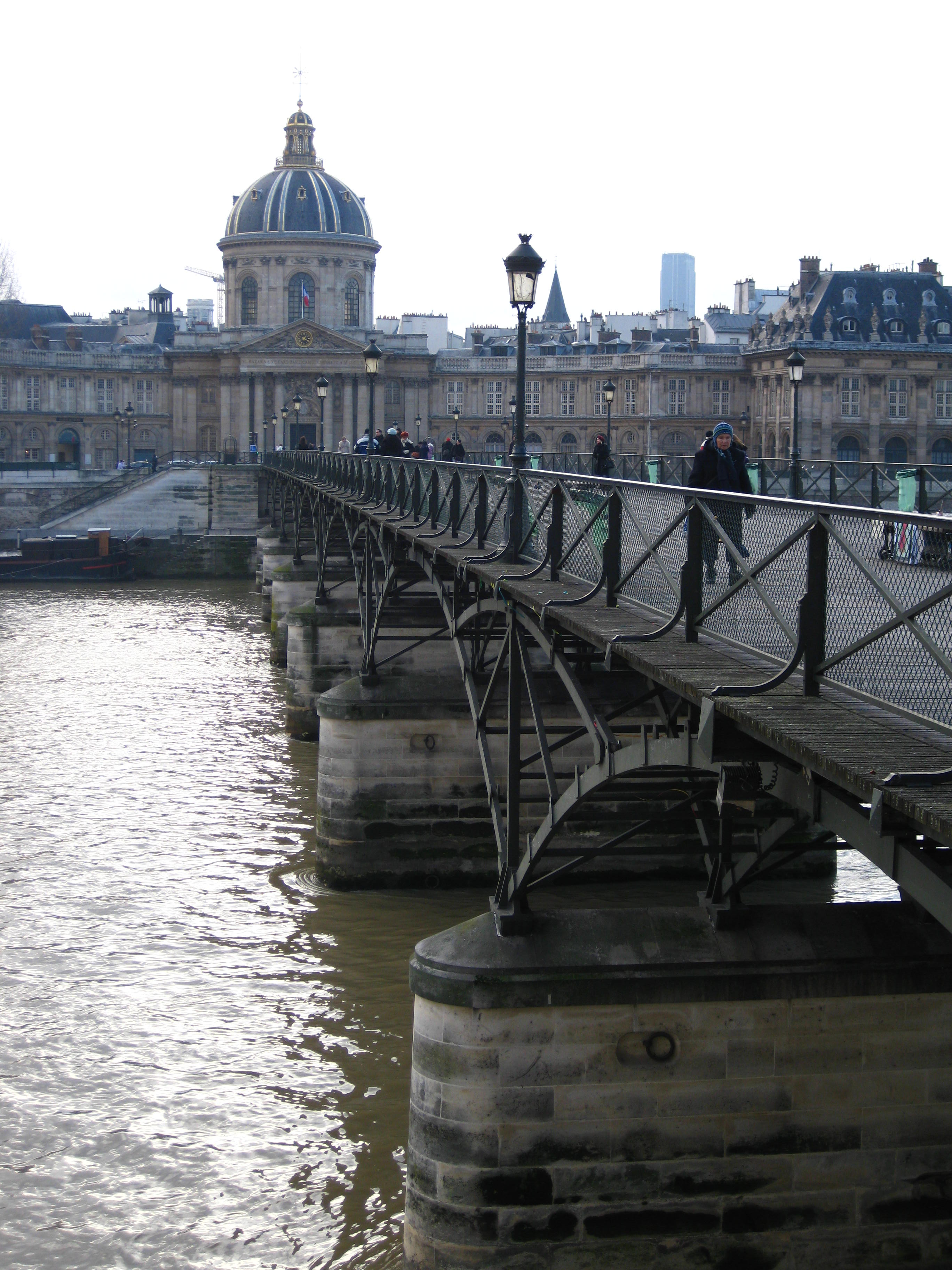 Institut de France et Pont des Arts en hiver